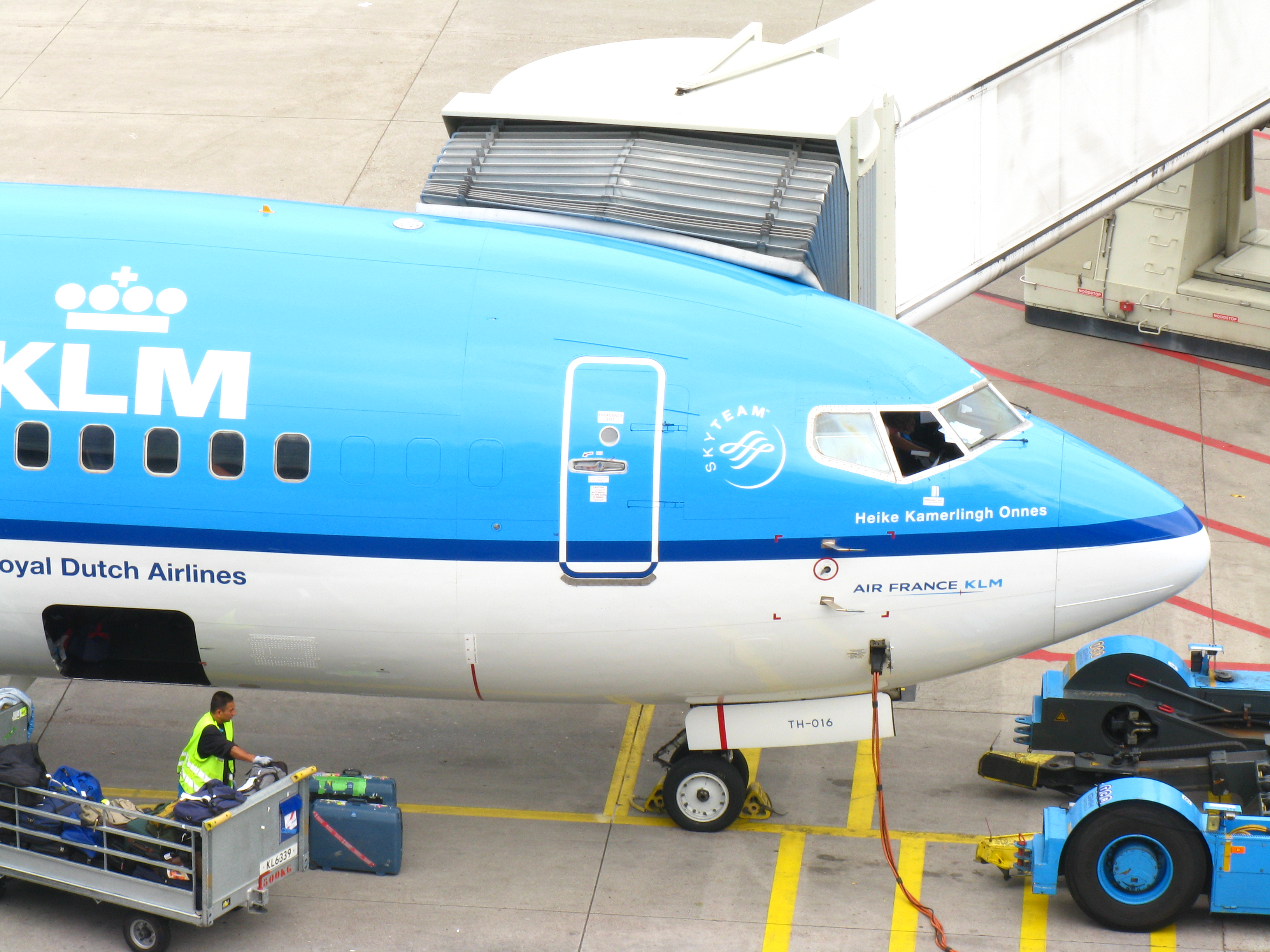 KLM-Vliegtuig genaamd naar Heike Kamerlingh Onnes